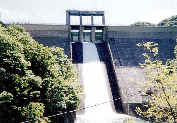 Dam